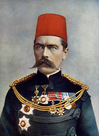 Herbert Kitchener, 1. Earl Kitchener of Karthoum als Sirdar